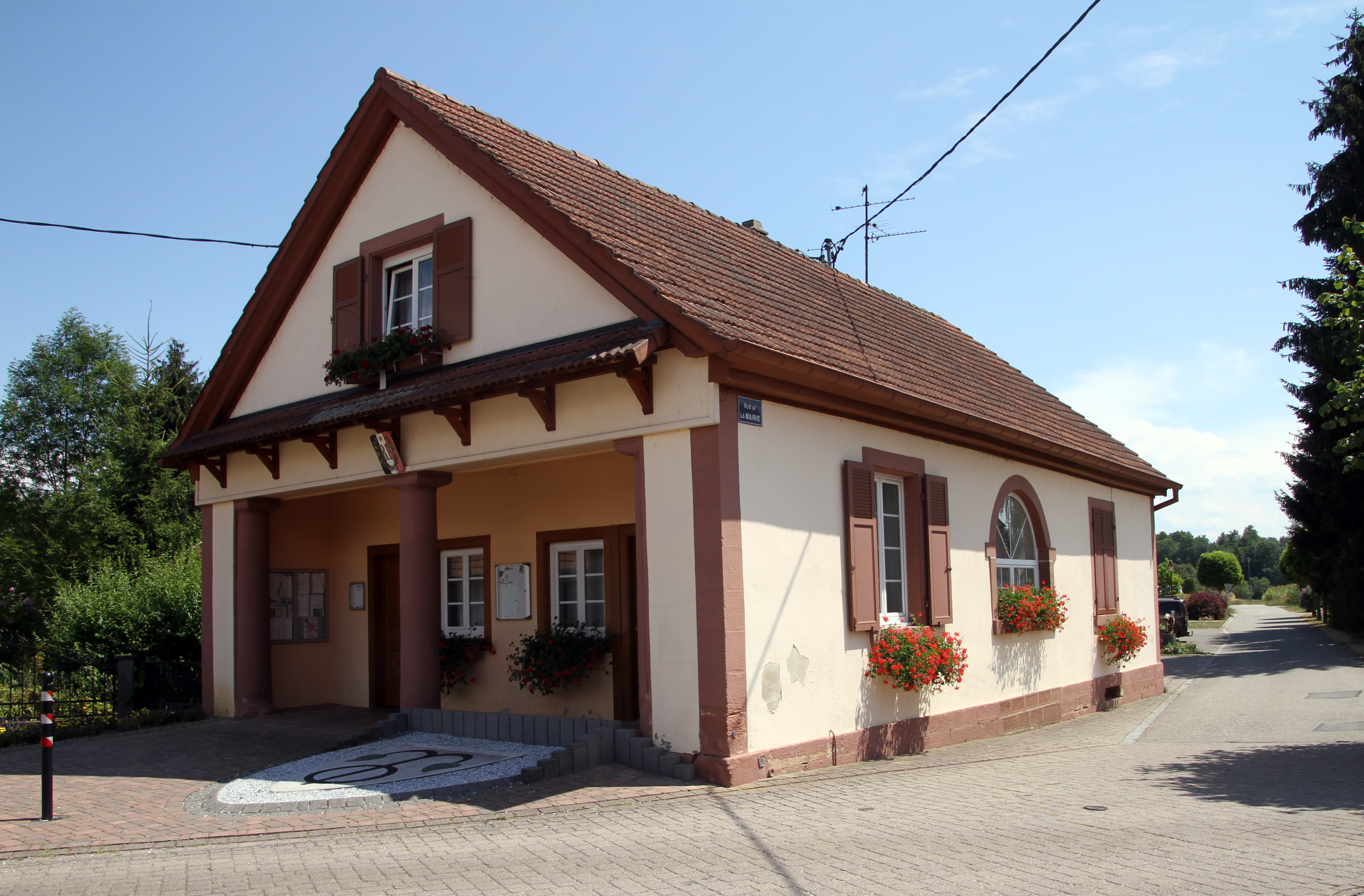 Kauffenheim